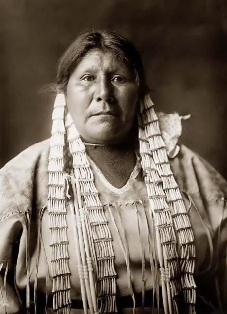 ჩეროკი ქალი